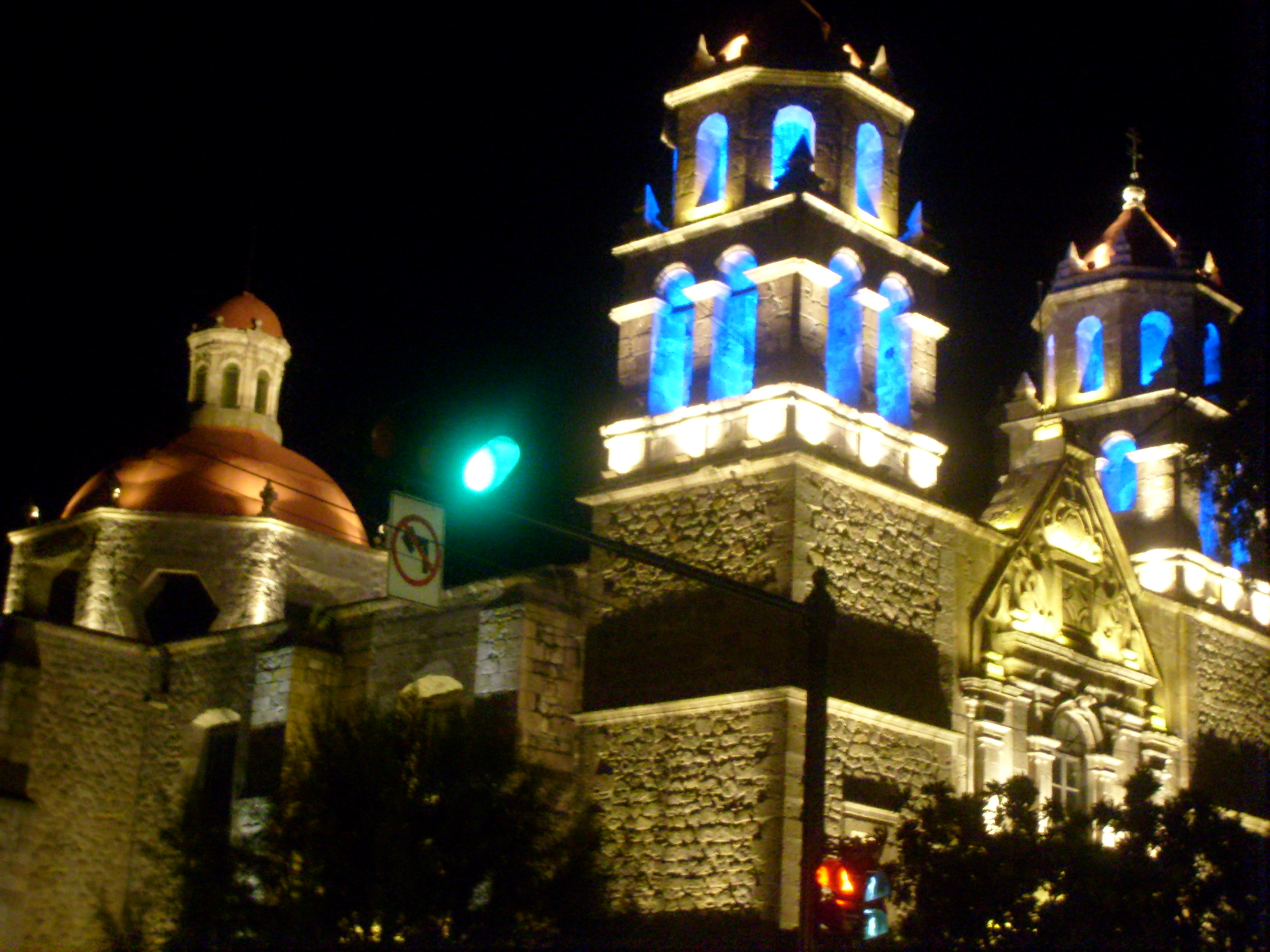 atntes una iglesia ahora una muy chida biblioteca